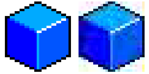 La compression GIF respecte le pixel